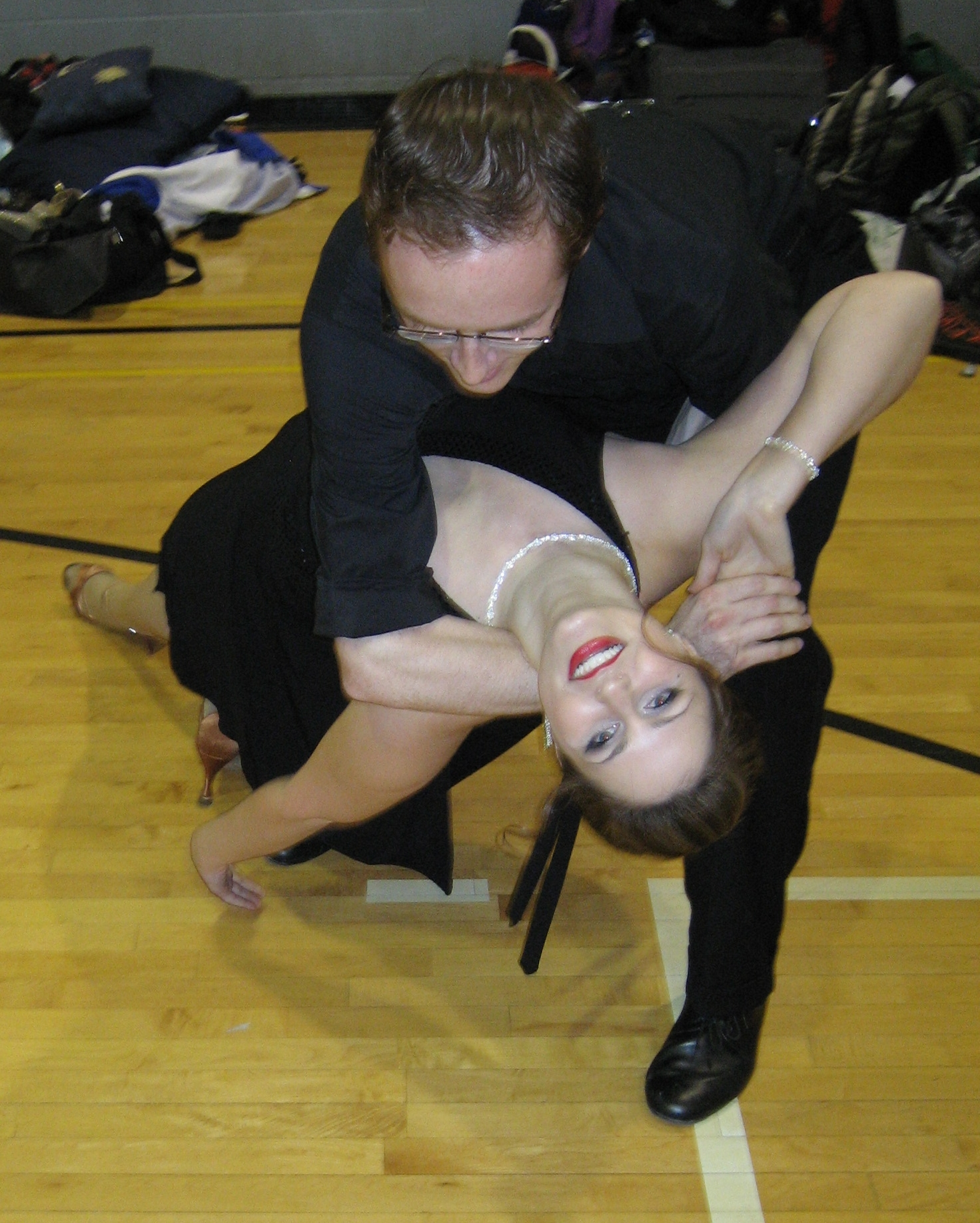 A dip in Salsa.